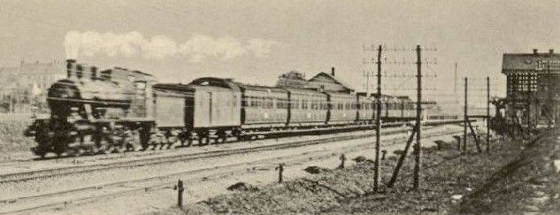 Postkarte der Sächsischen X V von 1901